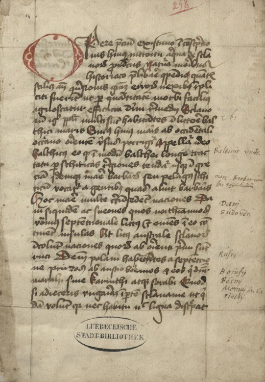 Helmold von Bosau: Anfang der Chronica Slavorum, Handschrift des 15. Jahrhunderts, Stadtbibliothek Lübeck, Ms. hist. 4° 4 (Schmeidler: 2)